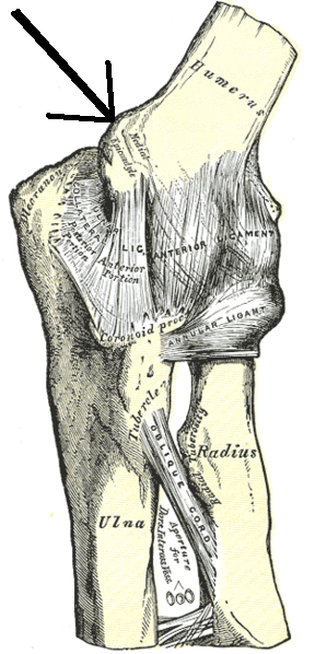 Módosítva